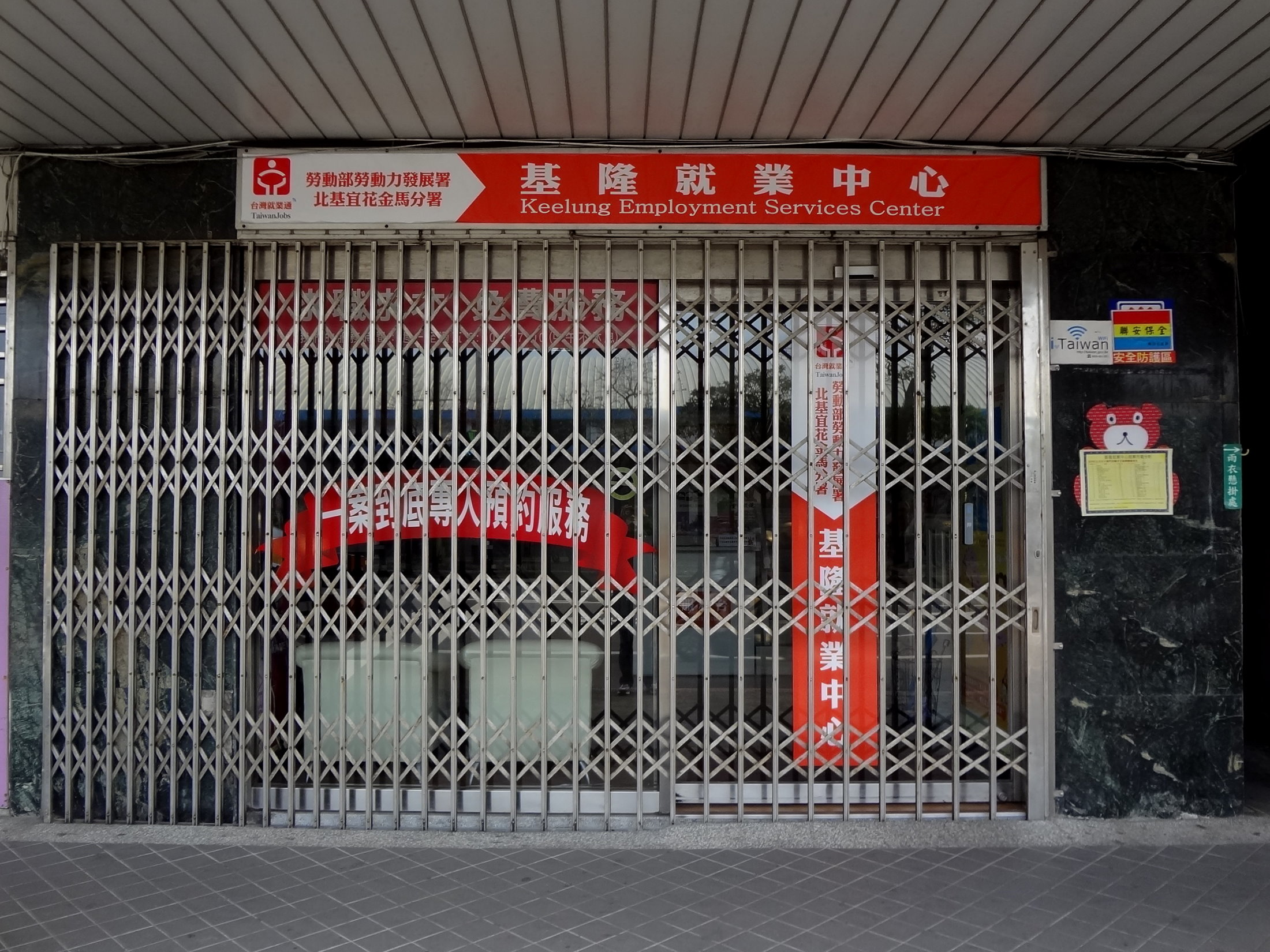 中華民國勞動部勞動力發展署北基宜花金馬分署基隆就業中心，地址：基隆市中正區中正路102號1、2樓。